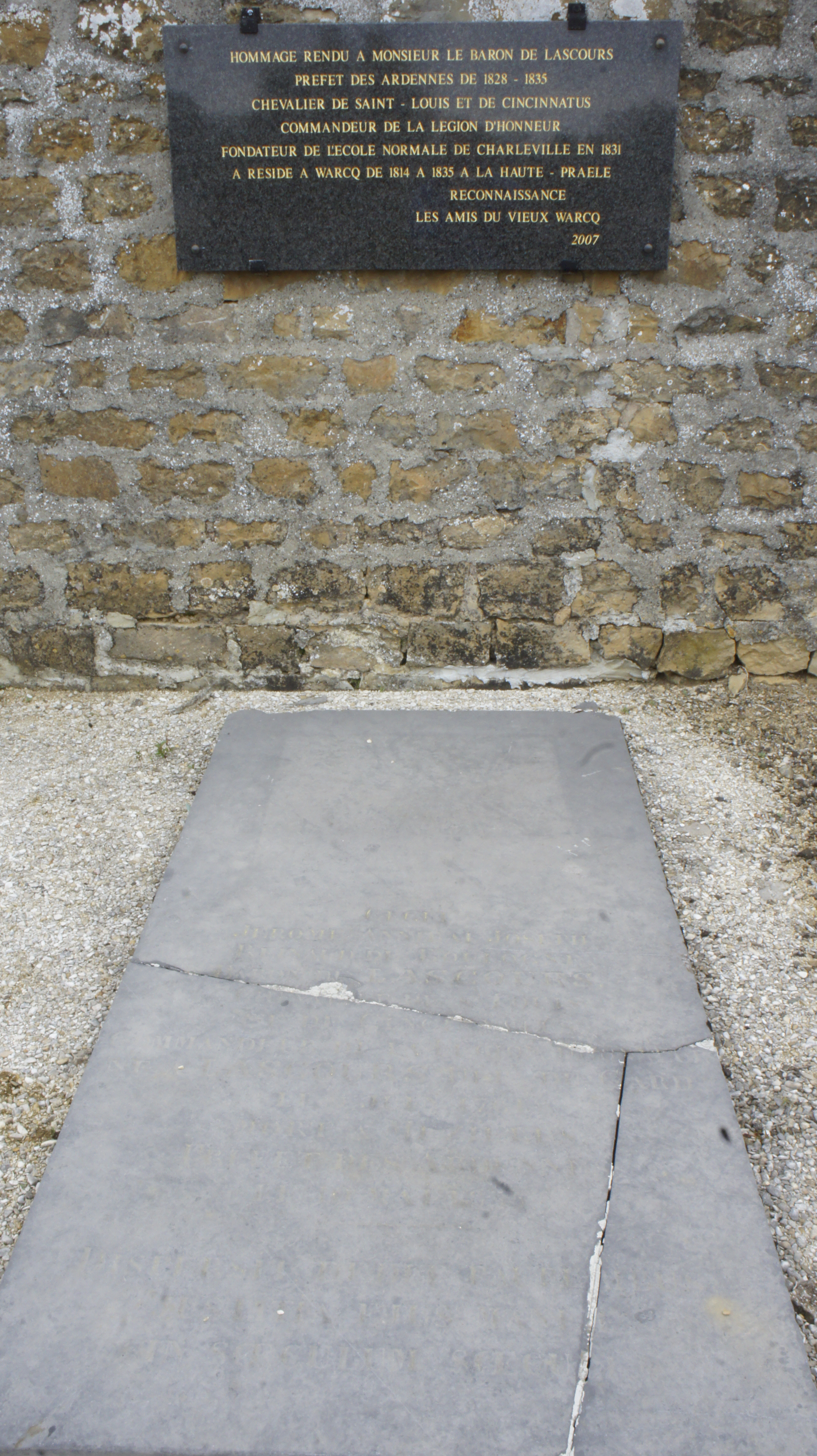 Jérôme Reynaud de Bologne de Lascours, ancine préfet et de la guerre des Amériques.